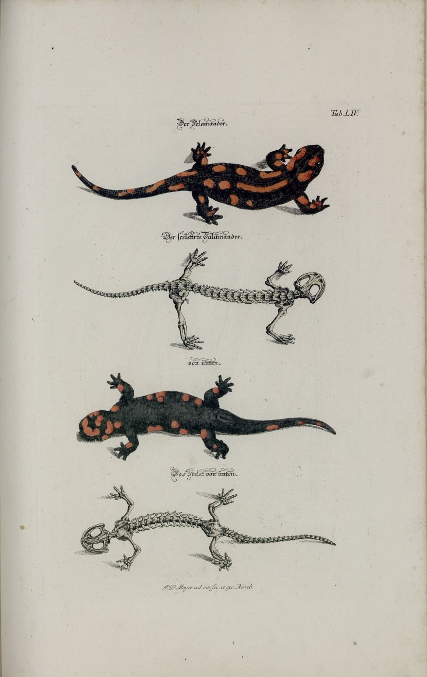 Angenehmer und nützlicher Zeit-Vertreib mit Betrachtung curioser Vorstellungen allerhand kriechender, fliegender und schwimmender, auf dem Land und im Wasser sich befindender und nährender Thiere, sowohl nach ihrer Gestalt und äusserlichen Beschaffenheit, als auch nach der accuratest davon verfertigten Structur ihrer Scelete oder Bein-Cörper, nebst einer deutlichen so physicalisch und anatomisch besonders aber osteologisch und mechanischen Beschreibung derselben / nach der Natur gezeichnet, gemahlet, in Kupfer gestochen und verlegt von Johann Daniel Meyer, Miniatur-Mahler in Nürnberg; Band 1; Nürnberg 1748 Tafel 54 Salamander